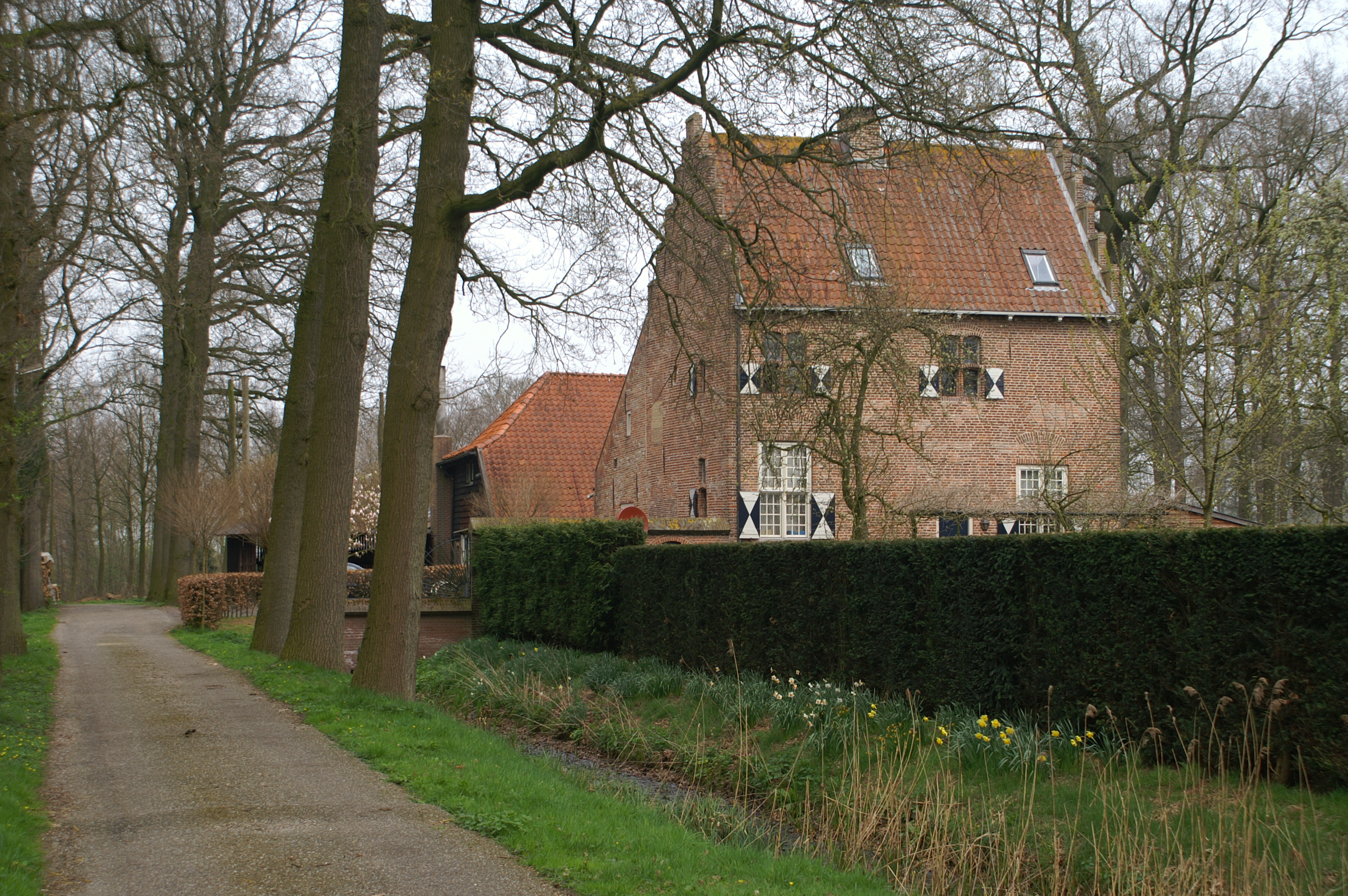 Spieker de Berencamp te Nijkerk.